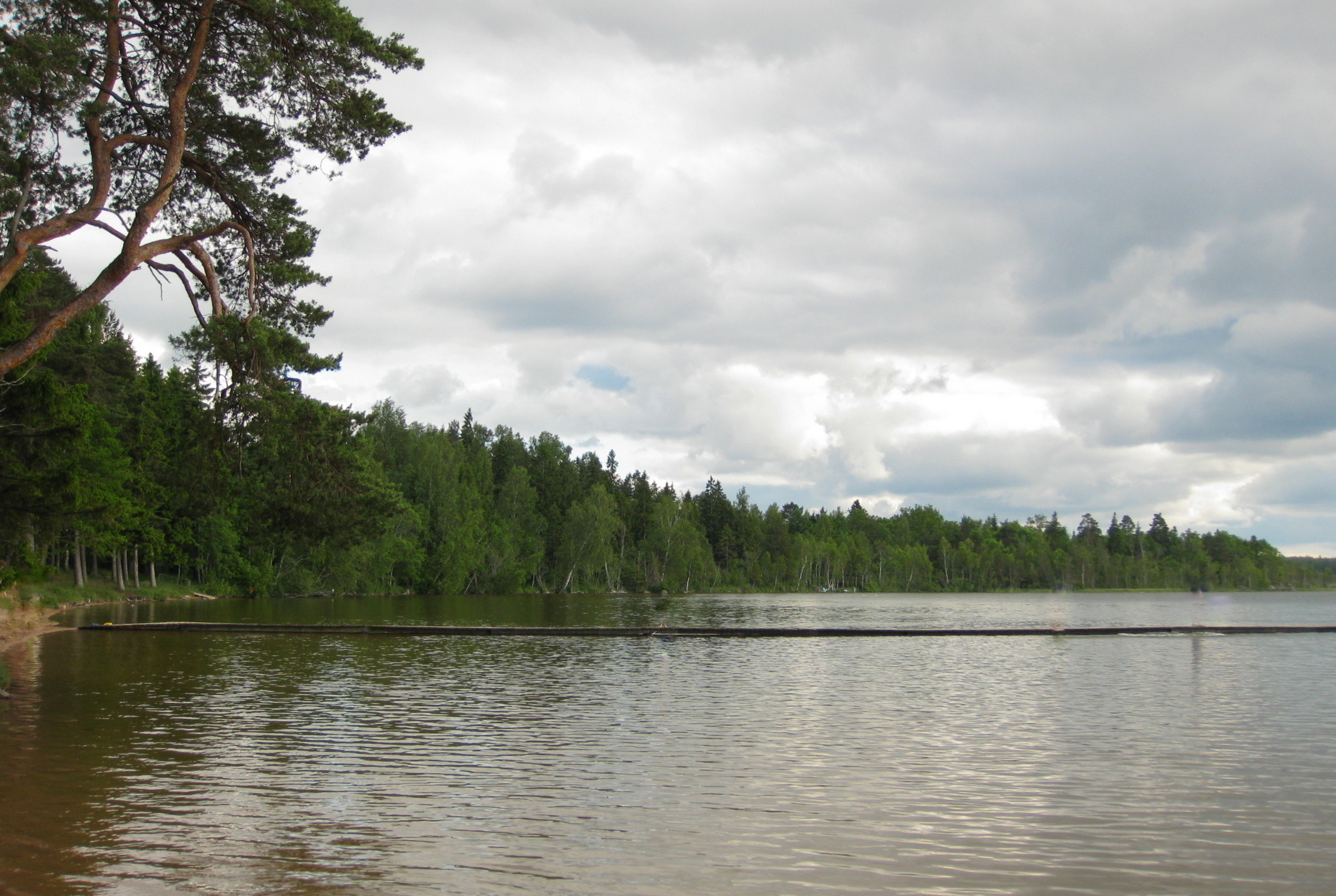 Karujärve idakaldal